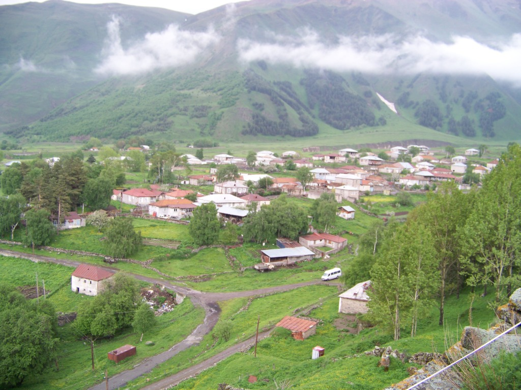 სოფელი სიონი